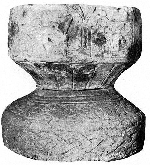 Tärby kyrka. Dopfunt